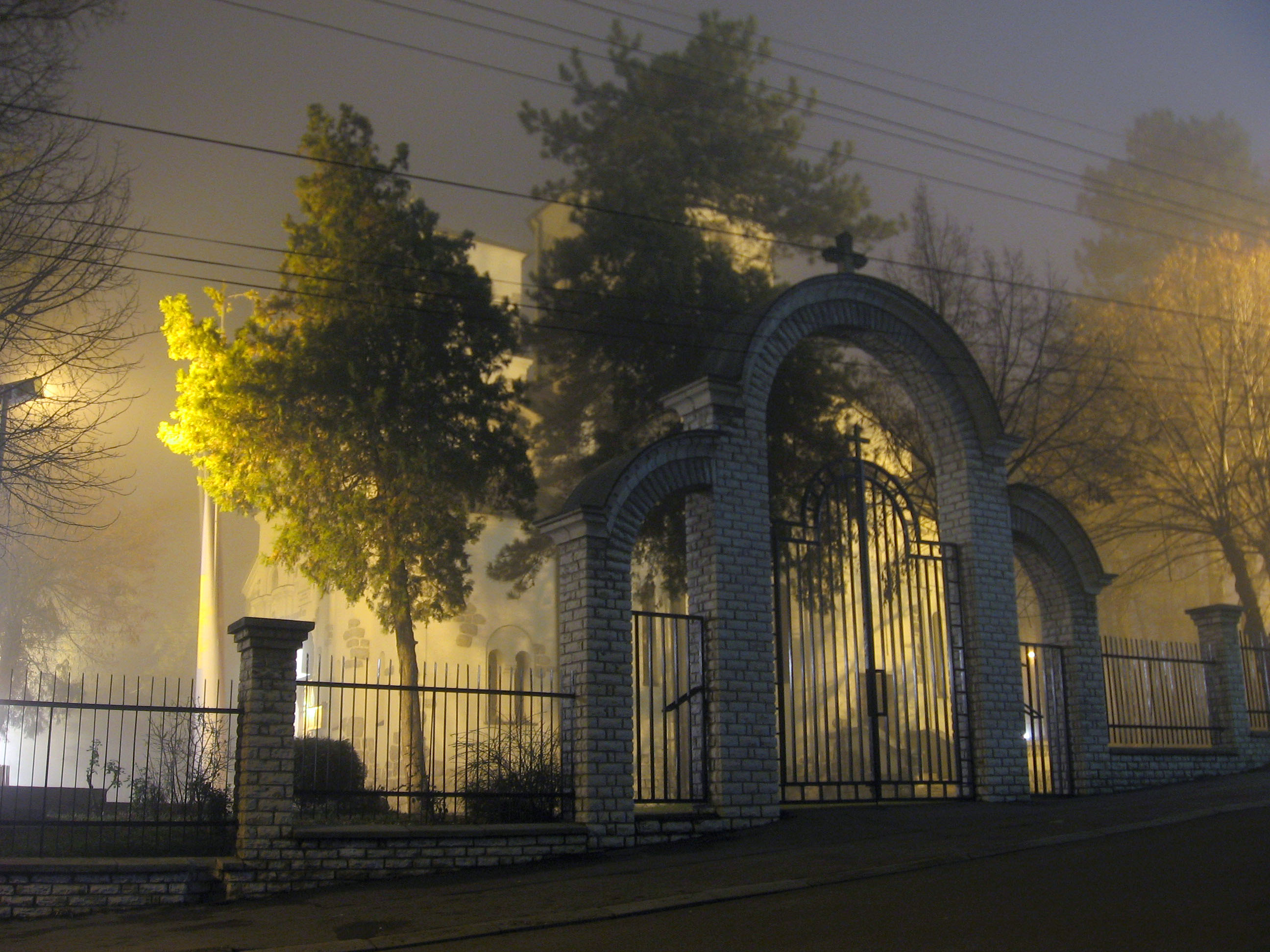 Kapija crkve Svetog Vaznesenja Bele Vode